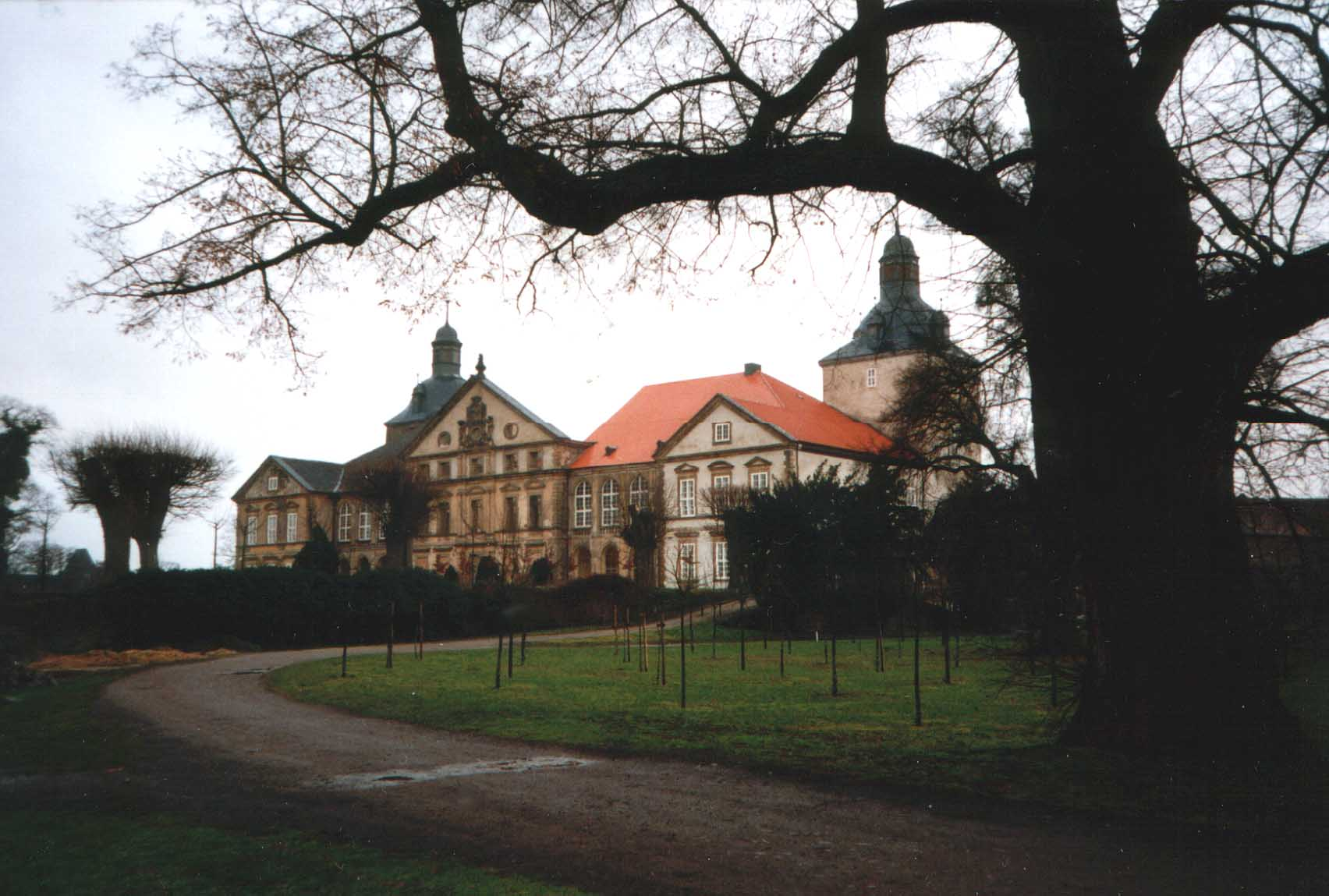 Vorfrühling am Schloss Hundisburg Selbst fotografiert im März 2001